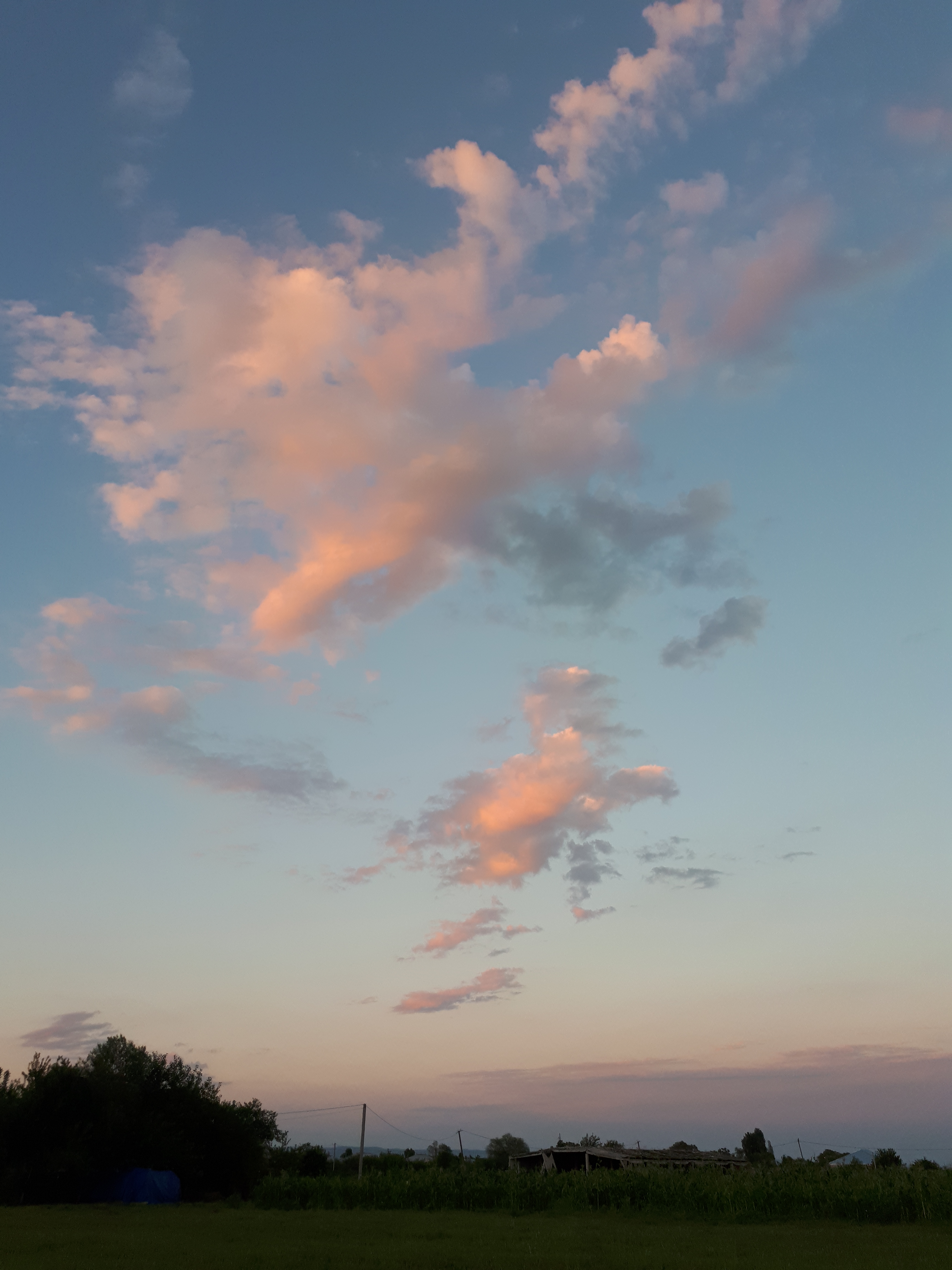 Buludlar